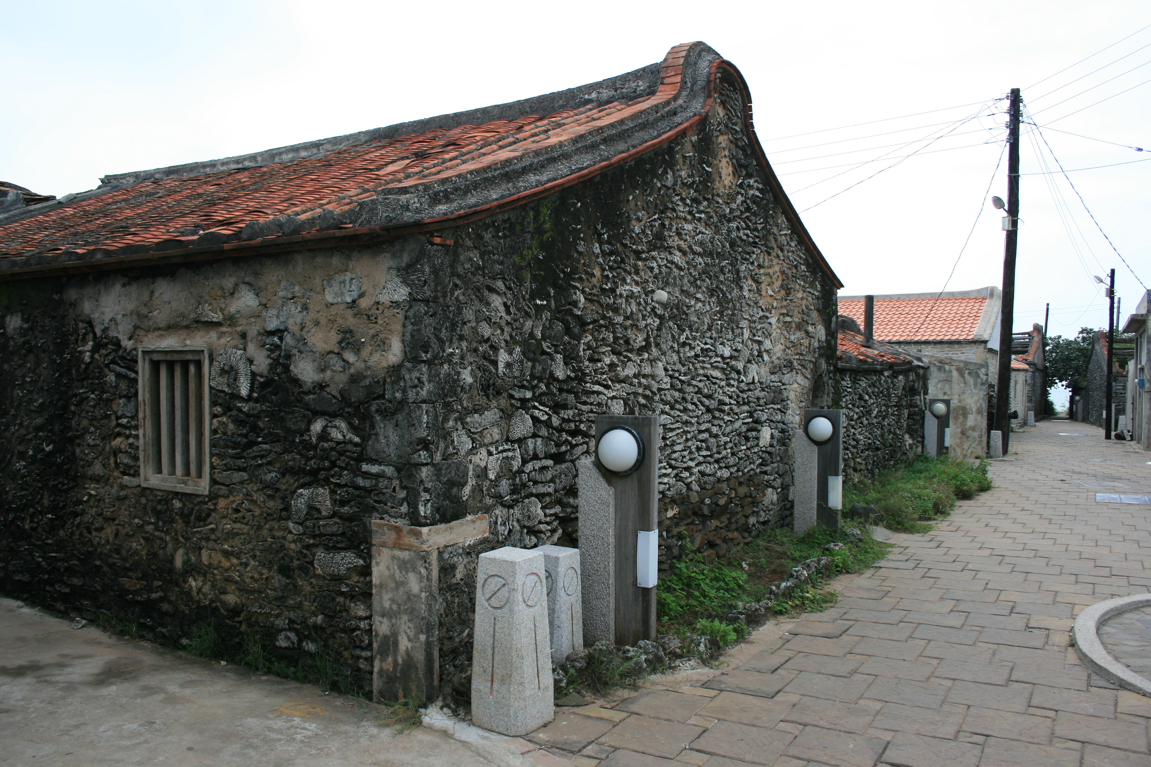 望安花宅聚落